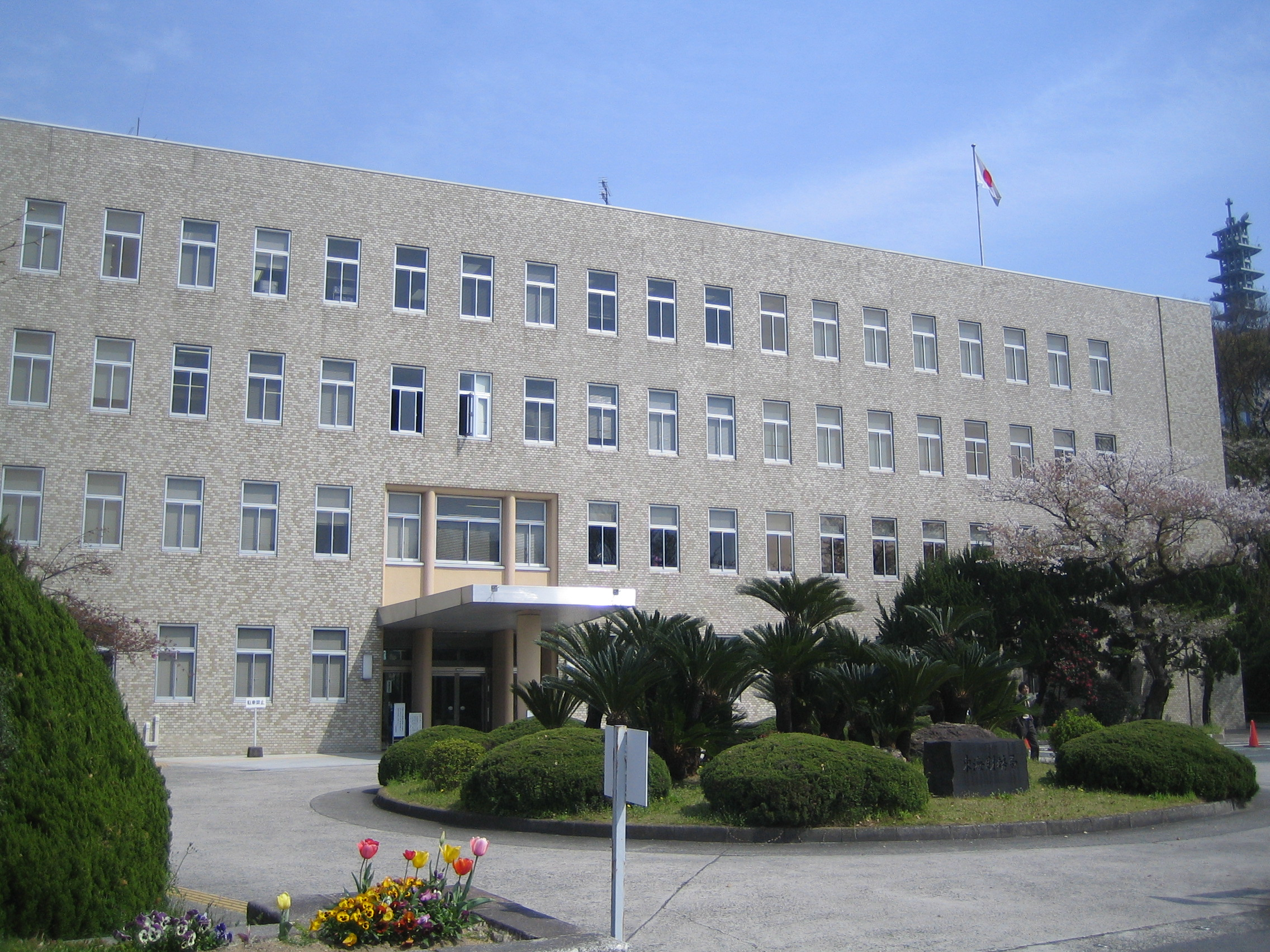 東海財務局。愛知県名古屋市 Tokai Local Finance Bureaus (東海財務局 Tōkai Zaimukyoku), in Nagoya, Aichi|Nagoya, Aichi, Japan